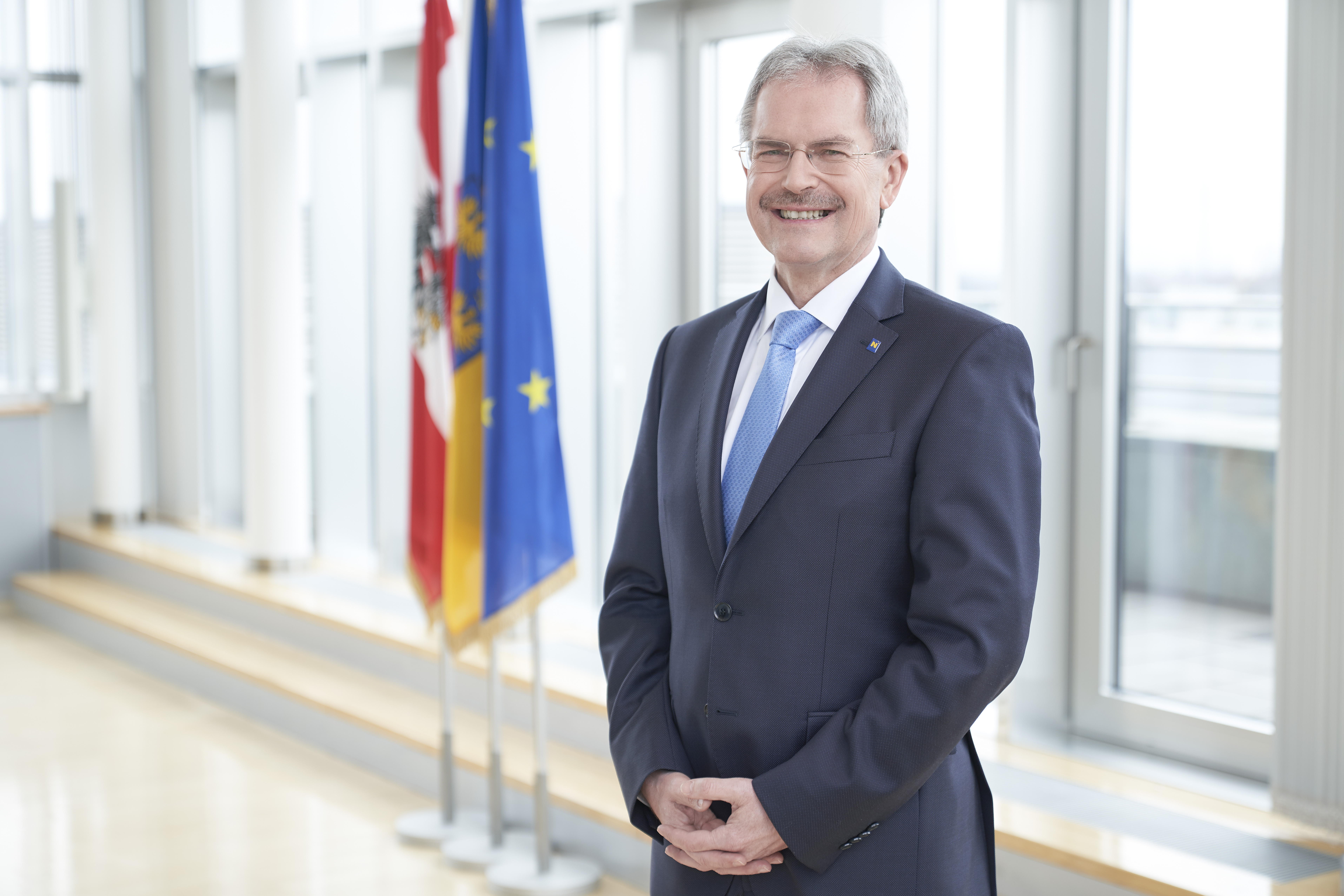 Portraitfoto von Niederösterreichs Landtagspräsident Karl Wilfing